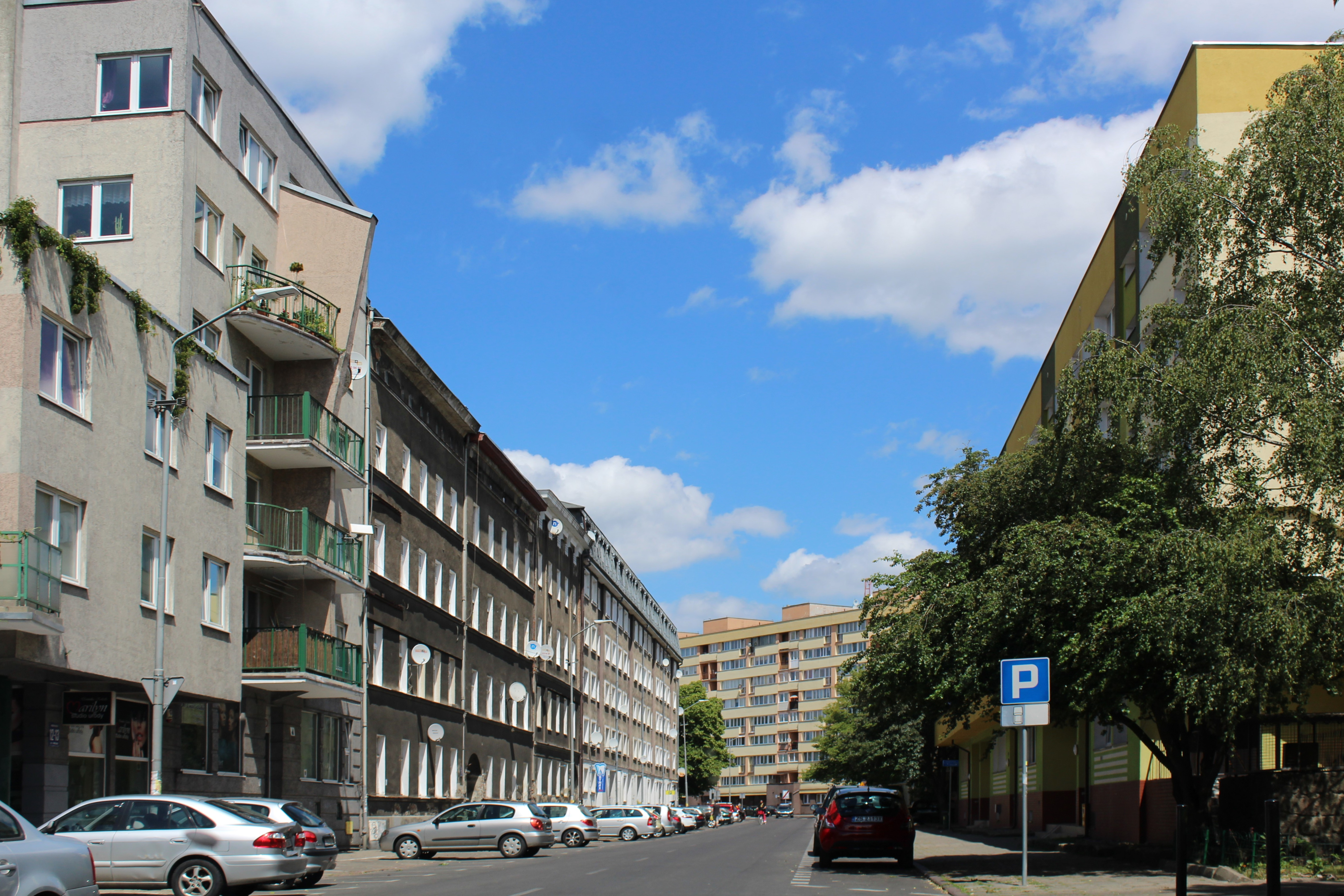 Ulica Podhalańska w Szczecinie, 2015 r.